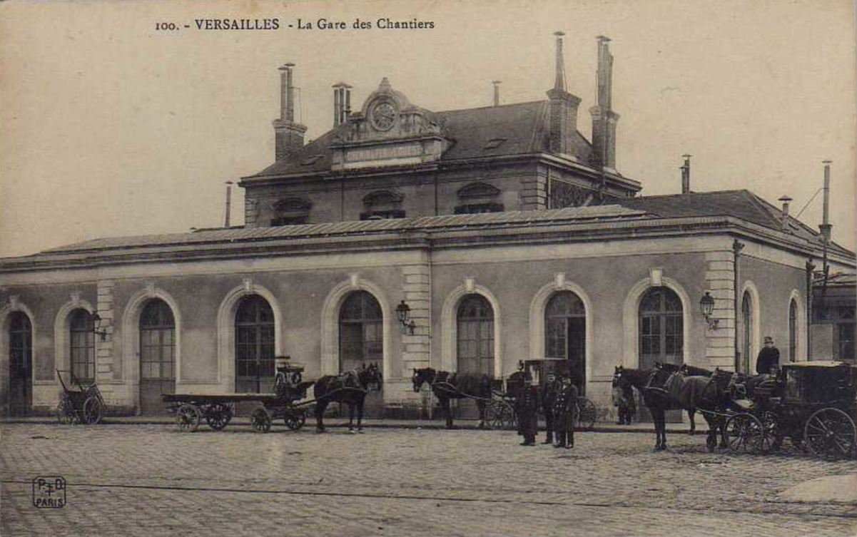 Carte postale du début du XXe siècle avec en photo l'ancienne gare des Chantiers devant laquelle attendant des attelages de chevaux.